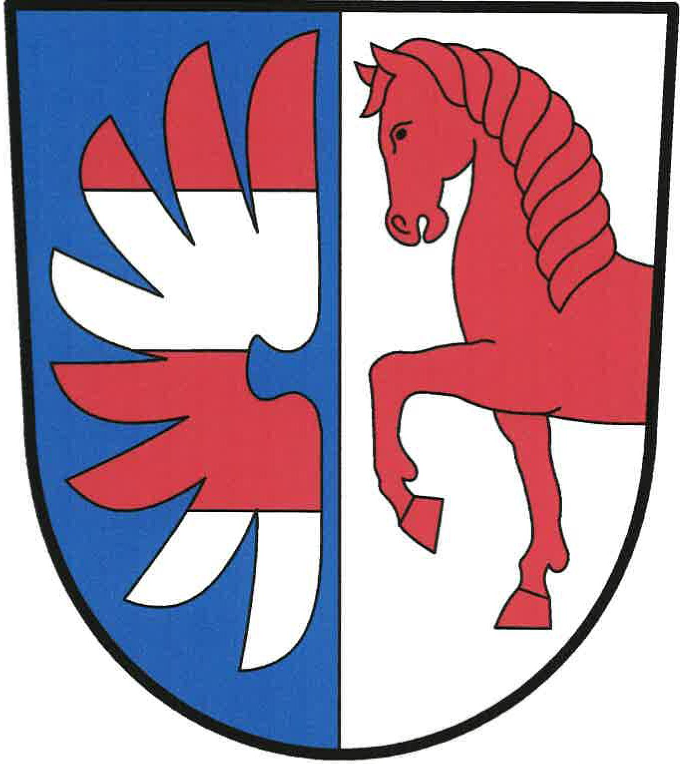 Znak tvořený třikrát děleným orlím křídlem převzatým z erbu Jindřicha Opršala z Jetřichovic, jež obec vlastnil od roku 1547 do roku 1569 a červeným koněm vykračujícím z okraje štítu na stříbrném pozadí představující název obce.